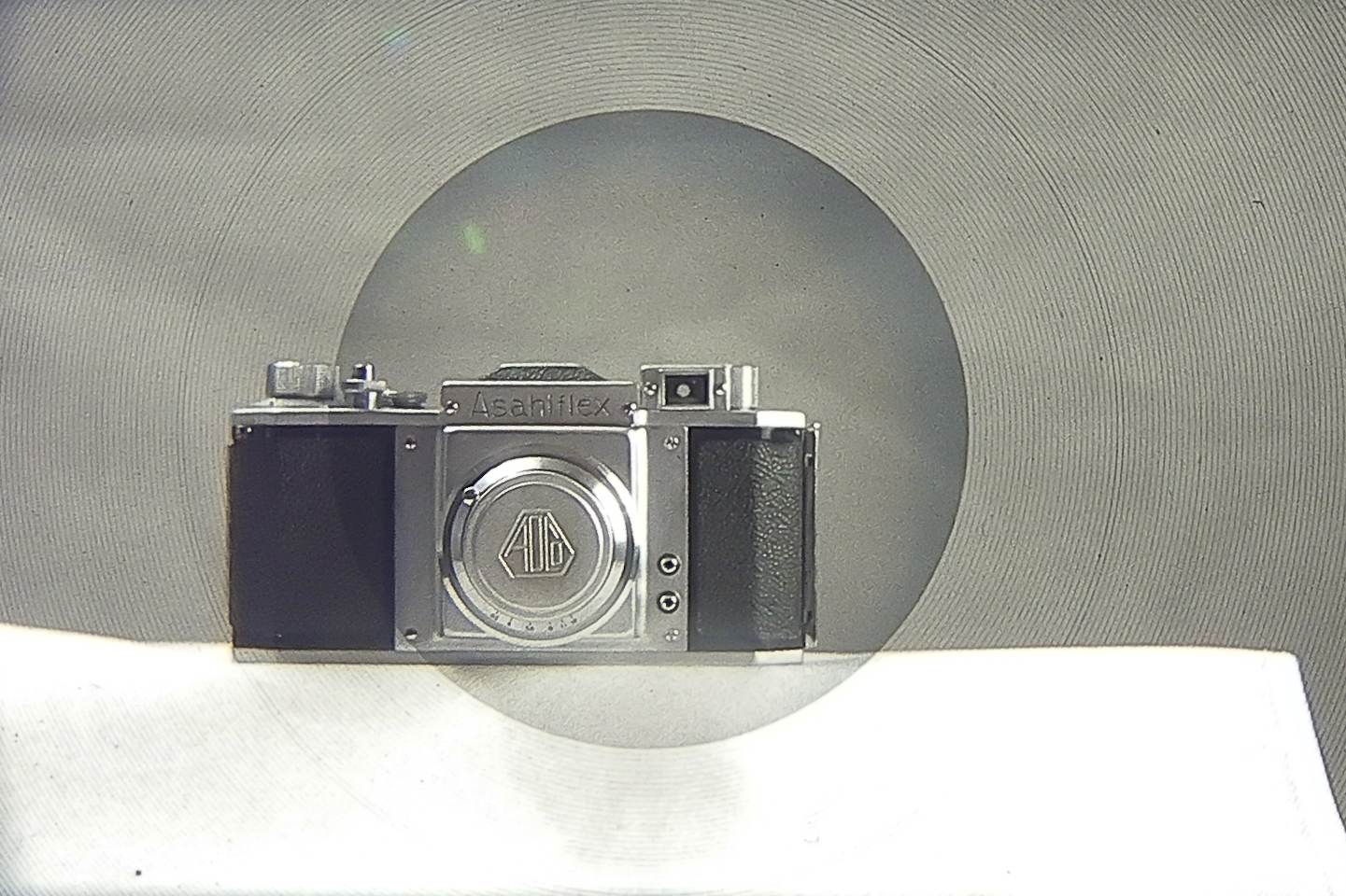 Видоискатель Asahi Pentax AP